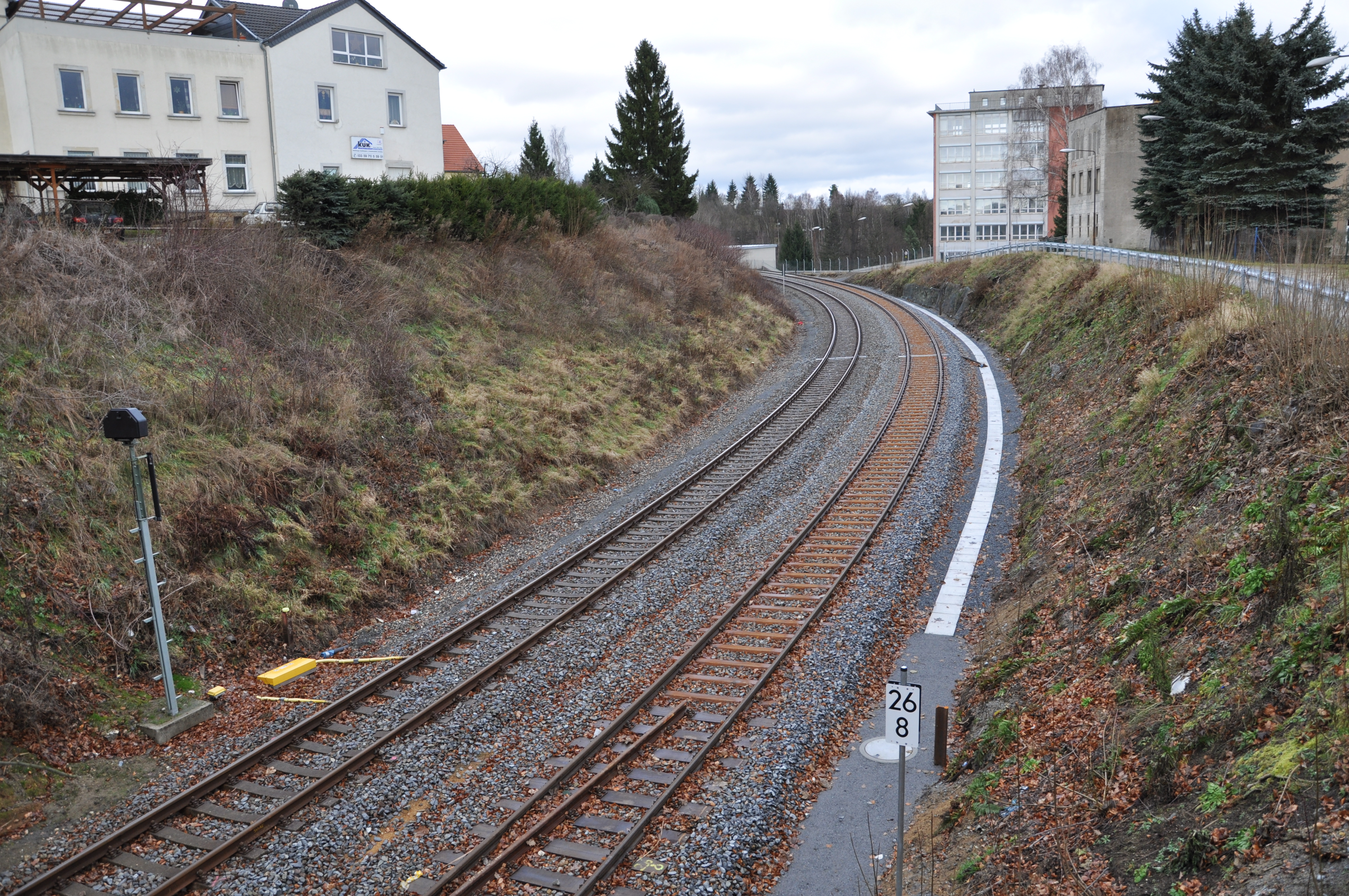 parallele Gleise der Strecken Bautzen–Bad Schandau und Rumburk–Sebnitz in Sebnitz